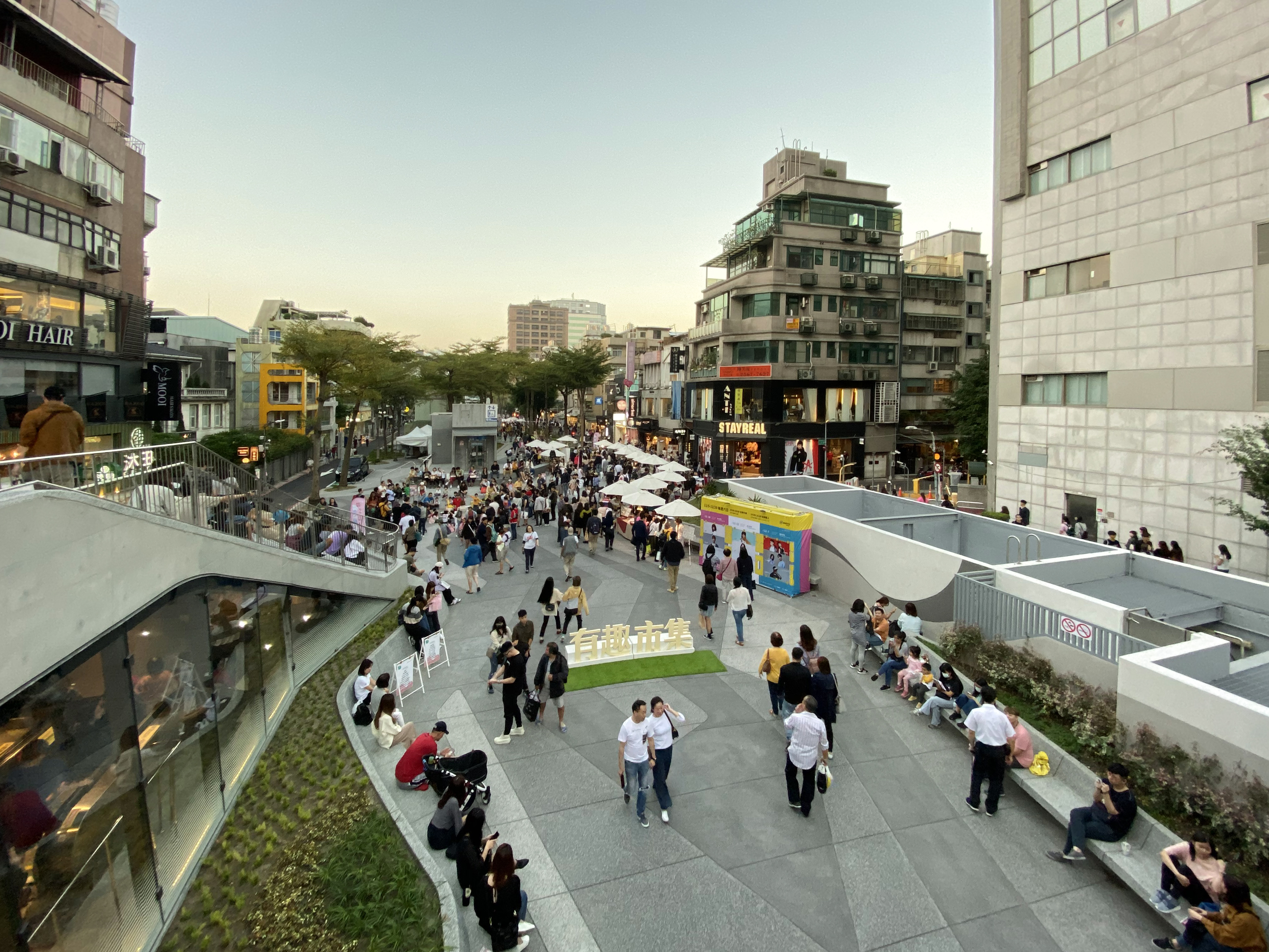 Zhongshan Shuanglian Linear Park